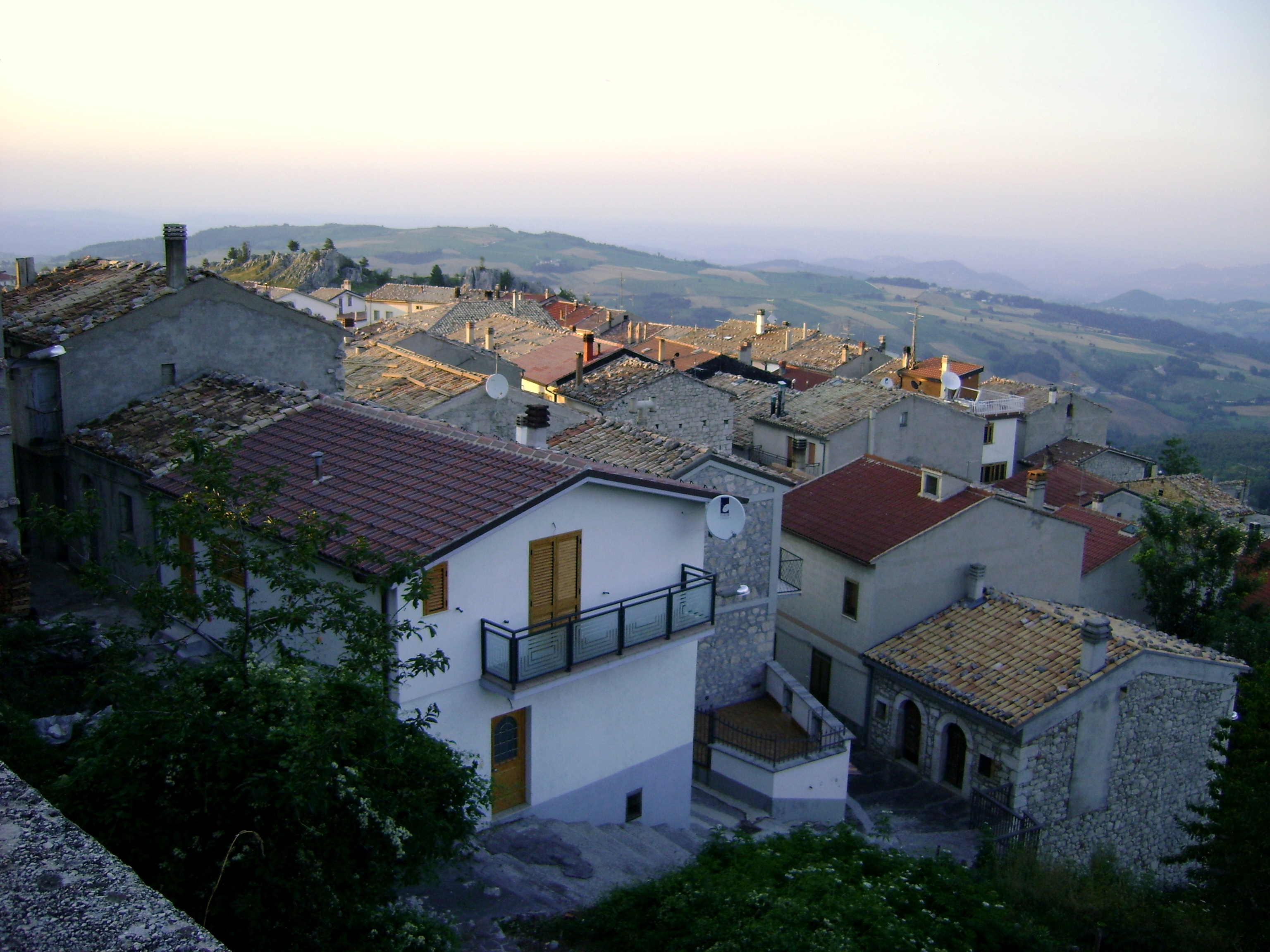 Veduta di Montenerodomo, Chieti.